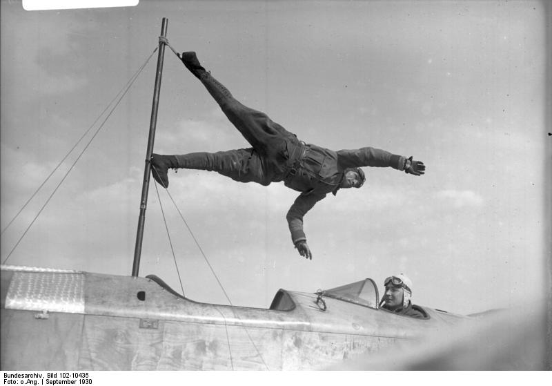 Der Luftakrobat Schindler, der König der Lüfte, zu Tode gestürzt! Der deutsche Luftakrobat Schindler, der König der Lüfte, stürzte in Böblingen bei Stuttgart bei einer Vorführung tödlich ab. Weitere drei Insassen wurden getötet. Der Flugakrobat Schindler bei einem seiner Kunststücke.